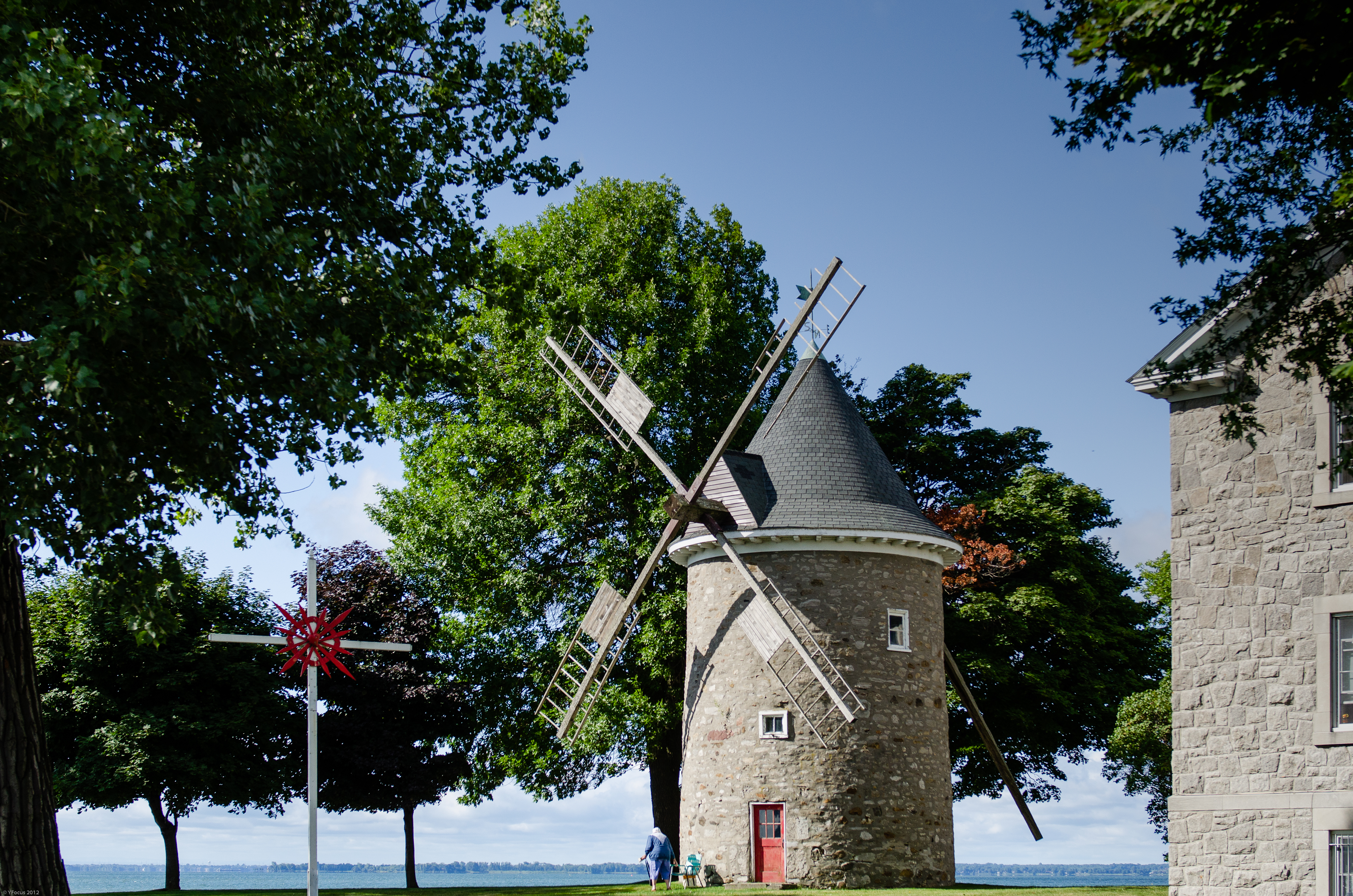 Moulin à vent de Pointe-Claire, de type français, un des rares moulin à vent subsistant au Québec.